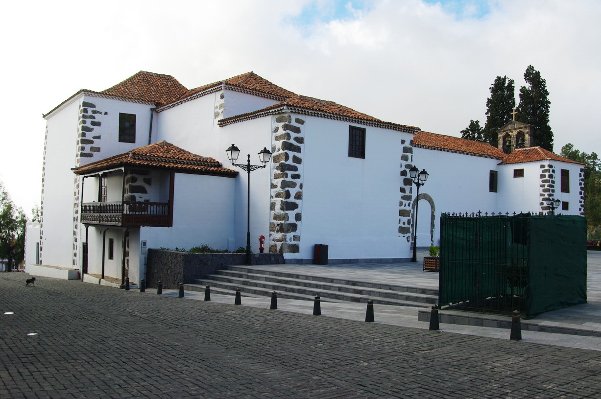 Pfarrkirche San Pedro Vilaflor, Teneriffa